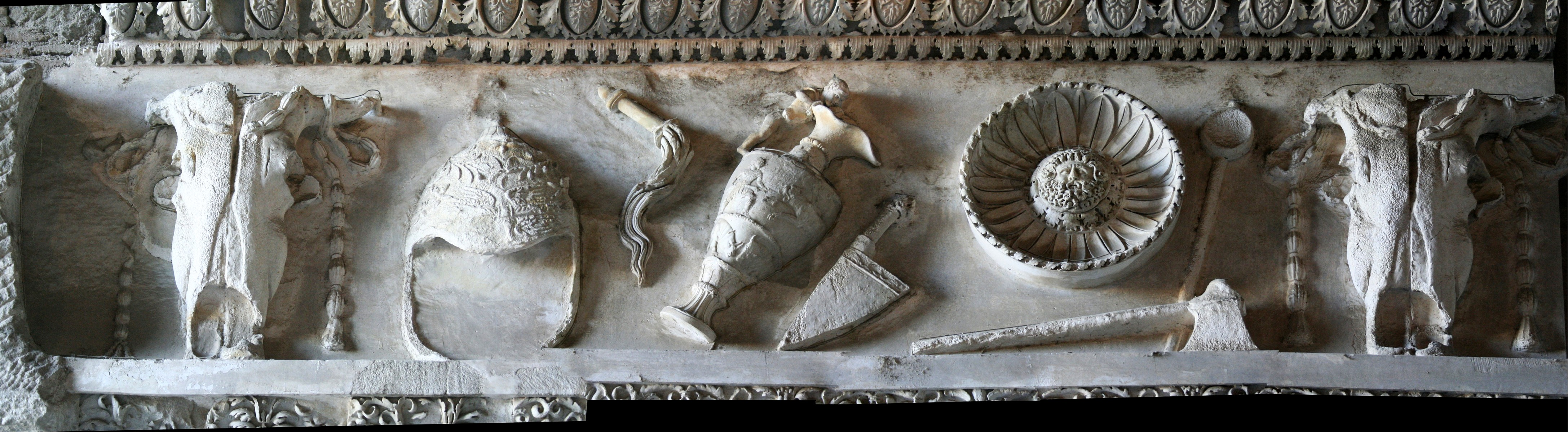 Détail de la frise du temple de Vespasien (galerie du Tabularium).